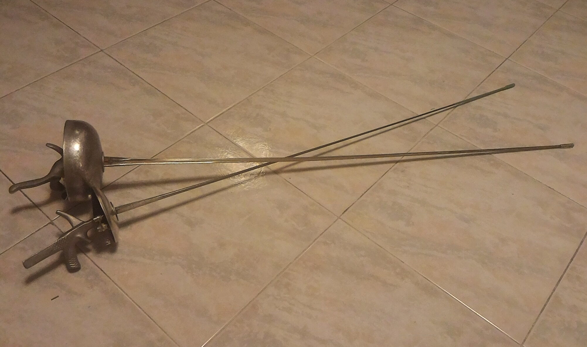 Up: left-handed pistol grip epee, down: left-handed pistol grip foil